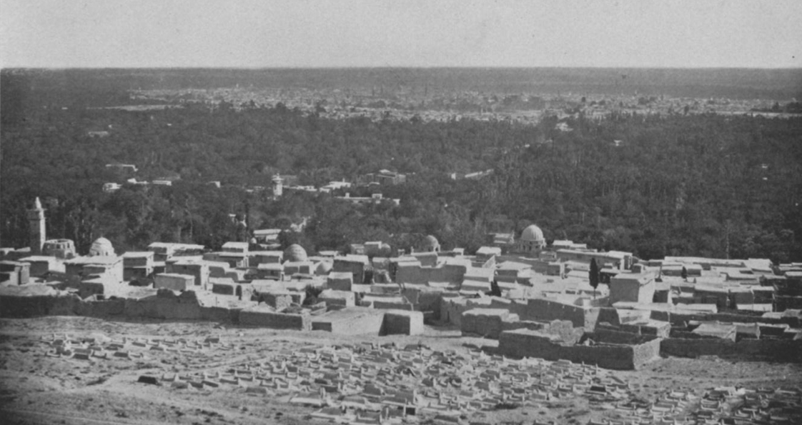 Damascus